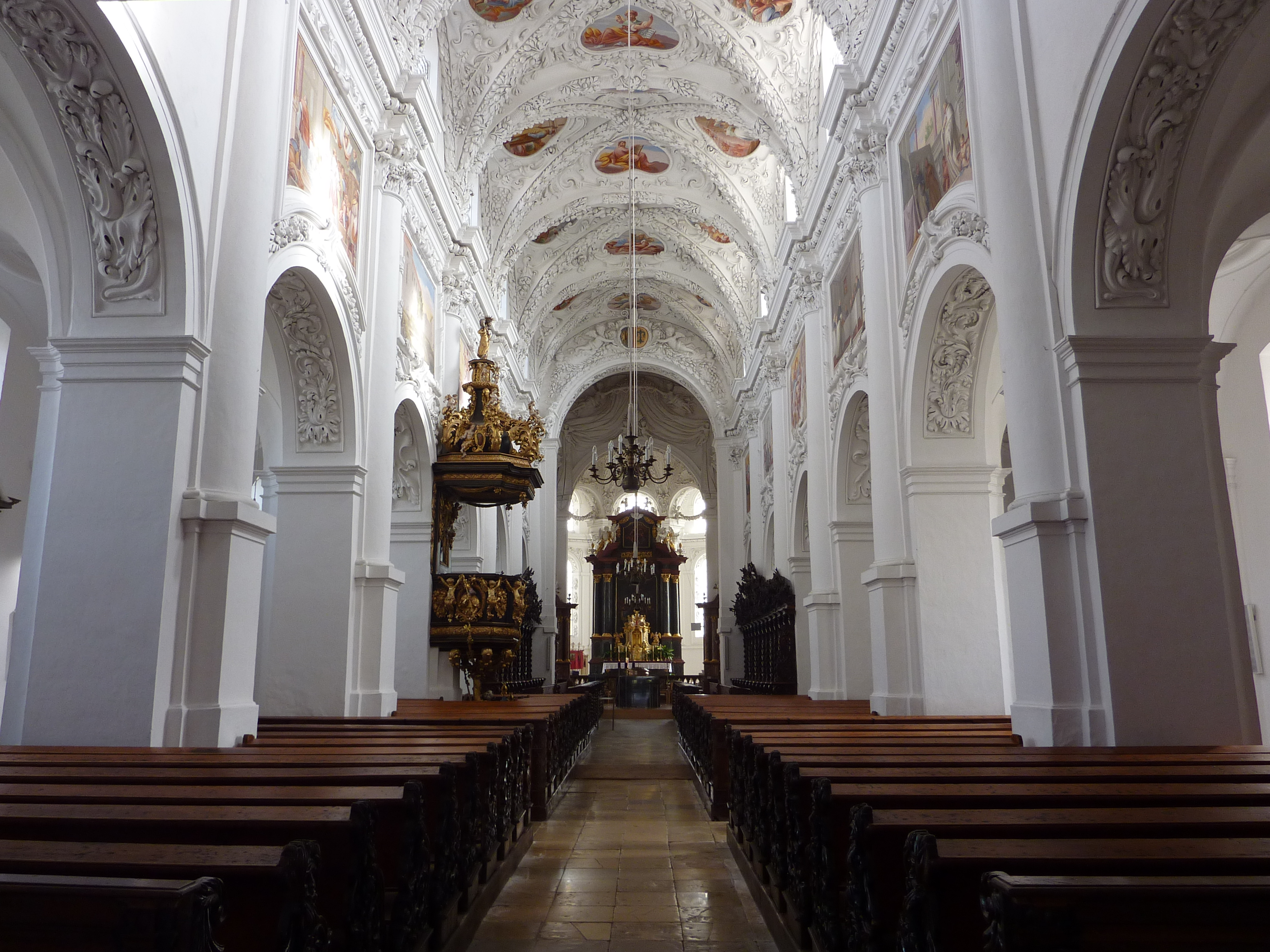 Pfarrkirche Mariä Himmelfahrt, ehem. Zisterzienserstiftskirche, Stift Baumgartenberg, Oberösterreich